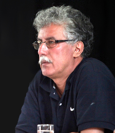 Parti communiste des ouvriers de Tunisie à Jemmal ; Hamma Hammami, secrétaire général